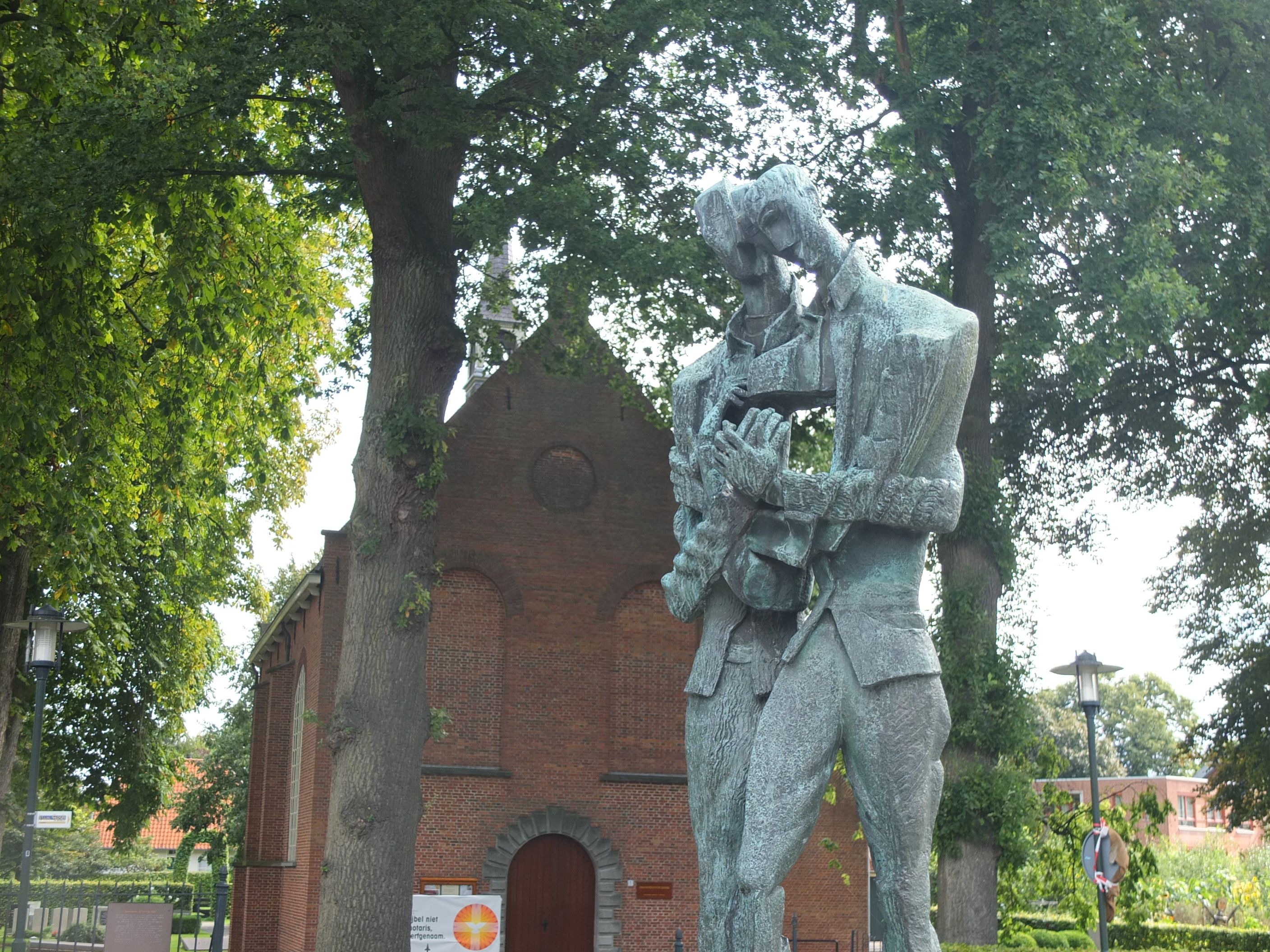 Standbeeld Theo en Vincent van Gogh nabij van Goghkerkje